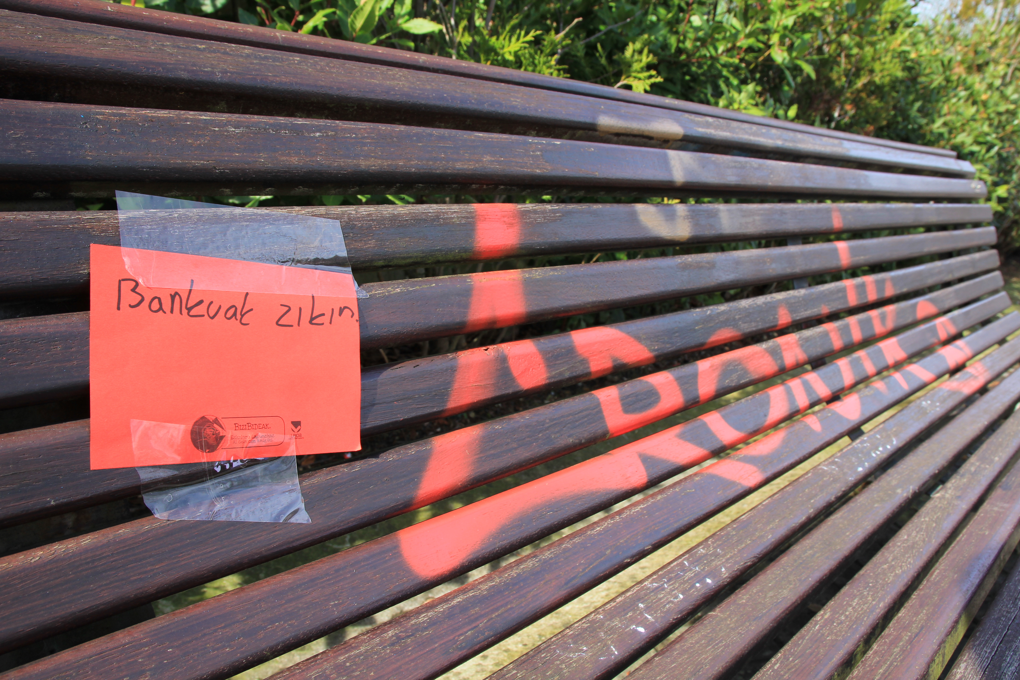 Leioaztar batzuk herria hobetzeko asmoz txartela berdeak eta gorriak jarri zituzten herriko hainbat toki publikotan.